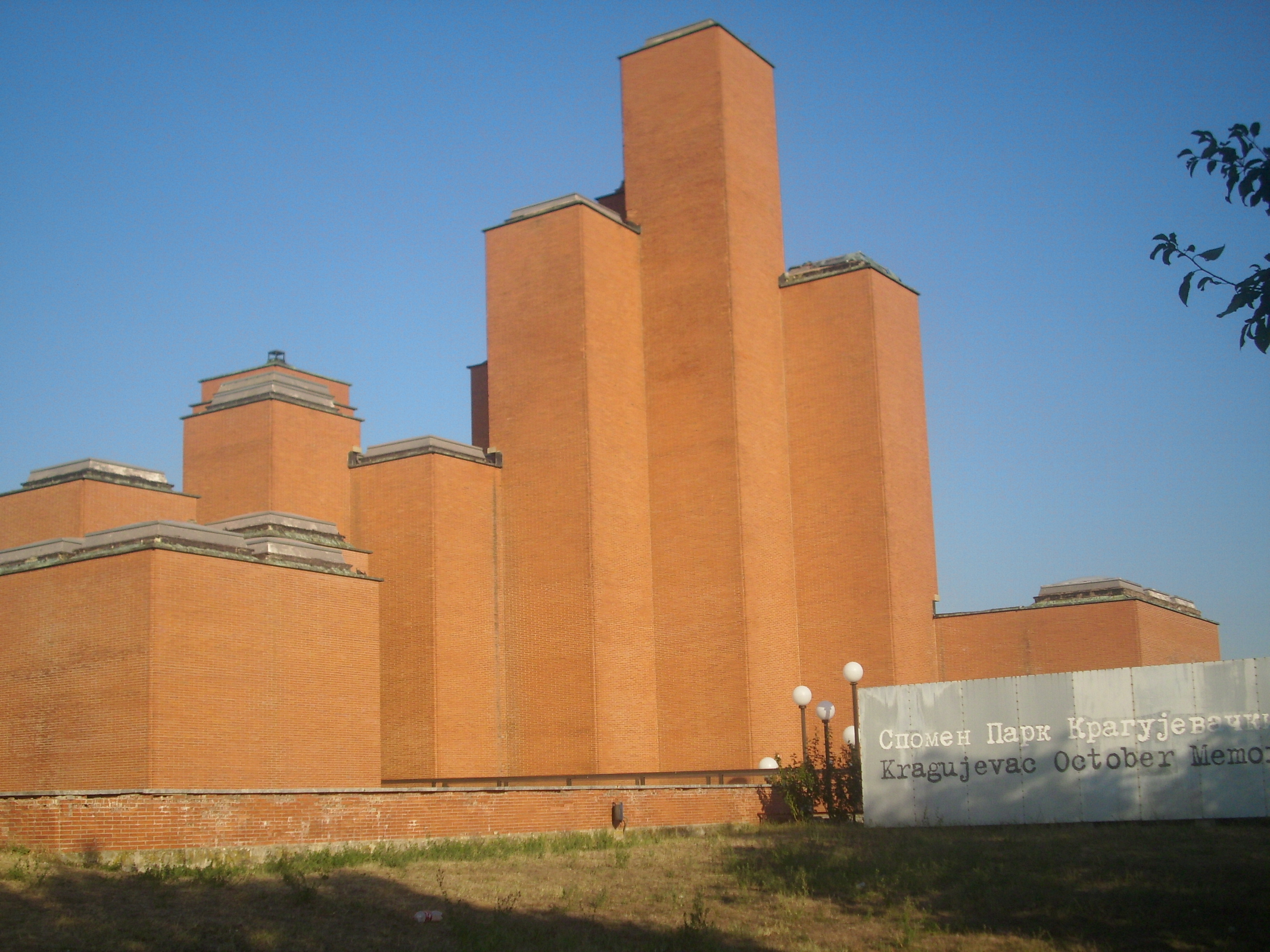 Музеј 21. октобар у Спомен-парку Крагујевачки октобар